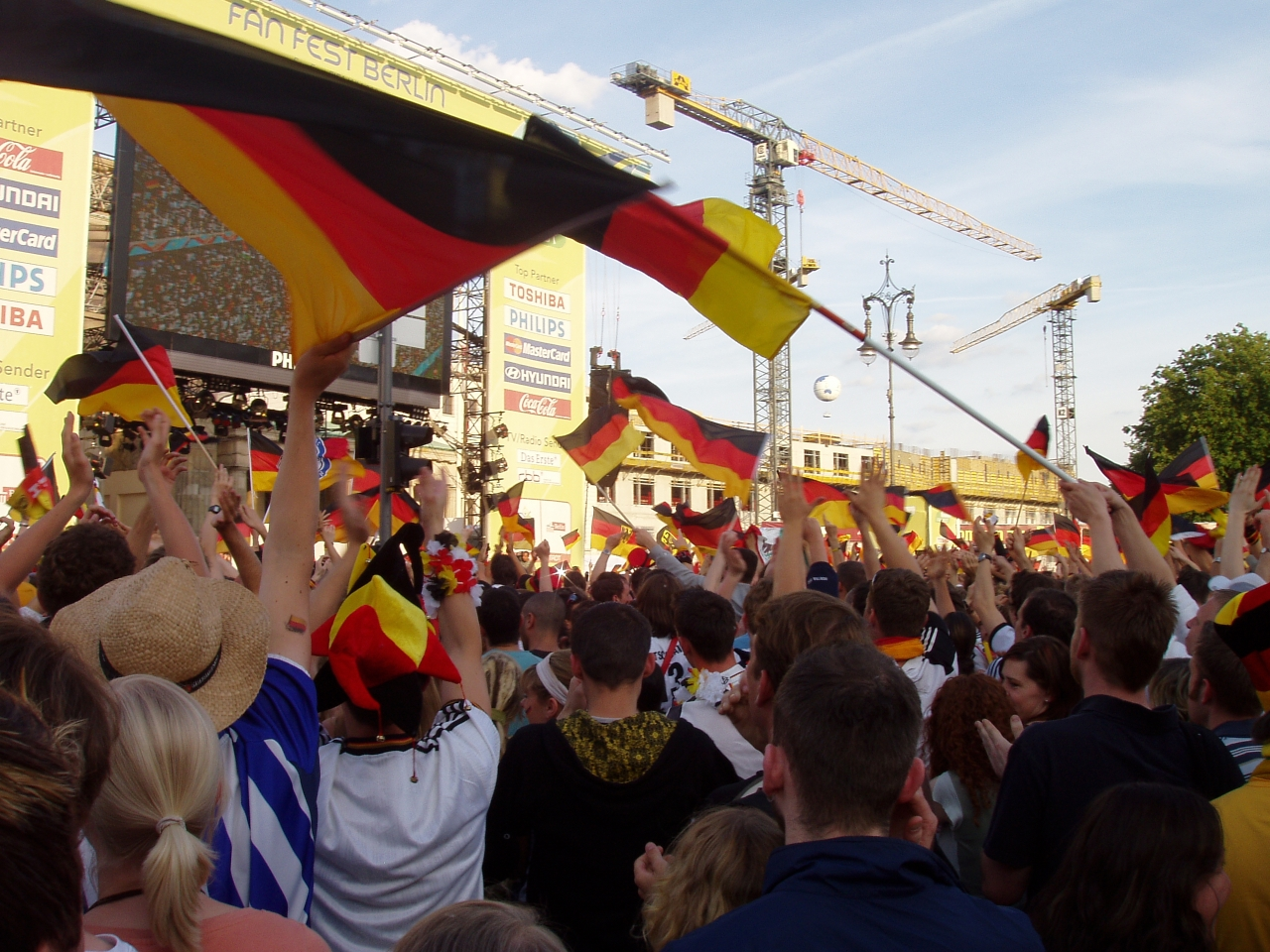 Public Viewing beim Eröffnungsspiel der WM 2006 in Berlin vor dem Brandenburger Tor